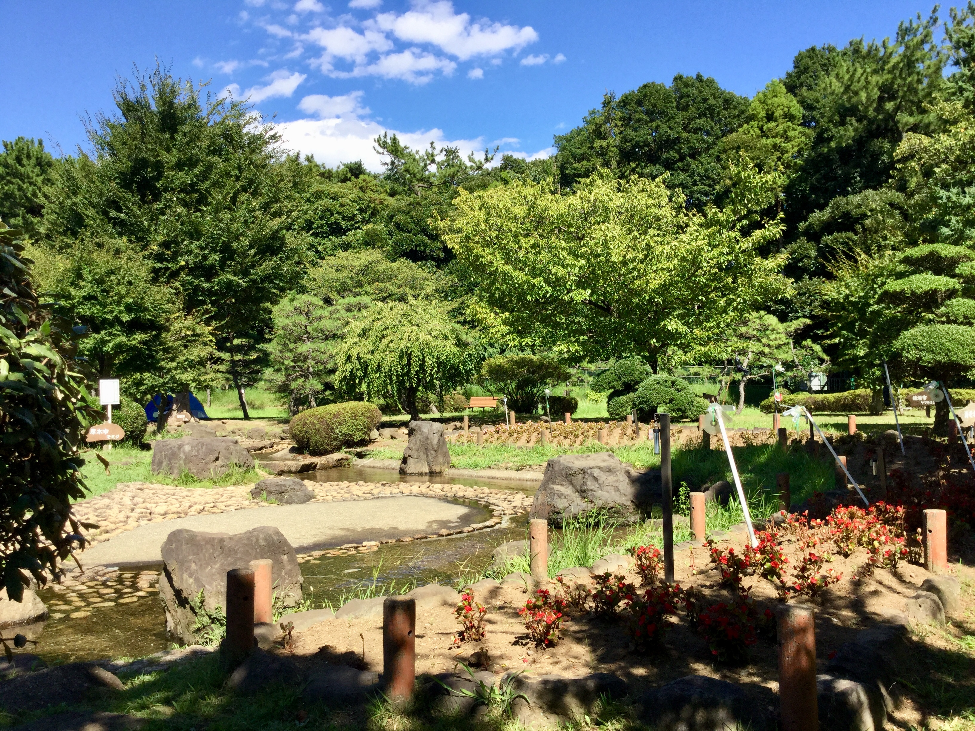 せせらぎ。